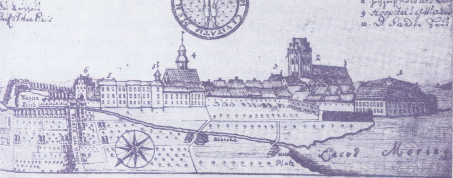 Morąg na starej rycinie